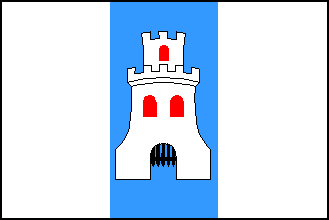 Bandera de Sarria, en Lugo (España)